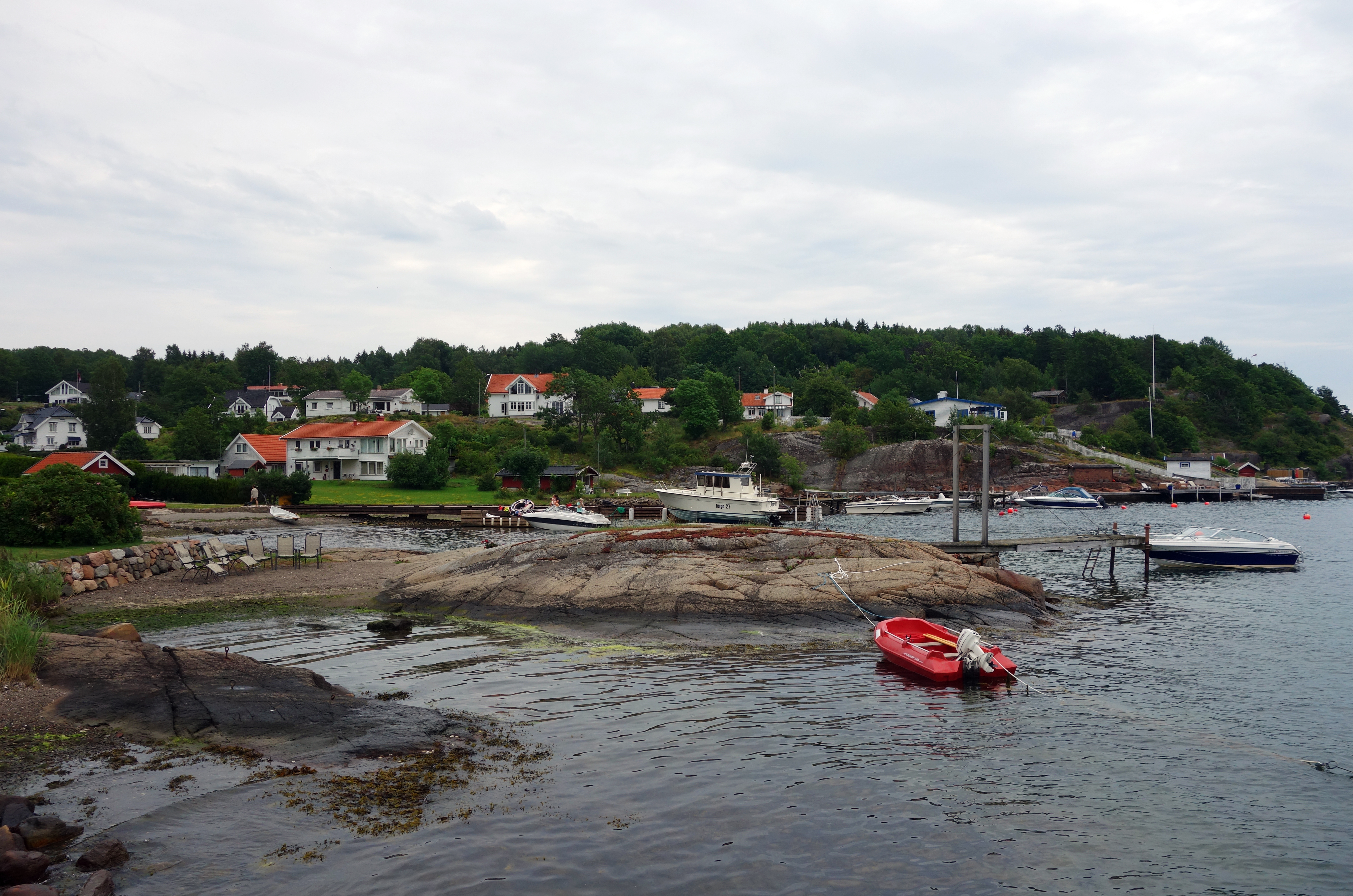 Strengsdal på Nøtterøy